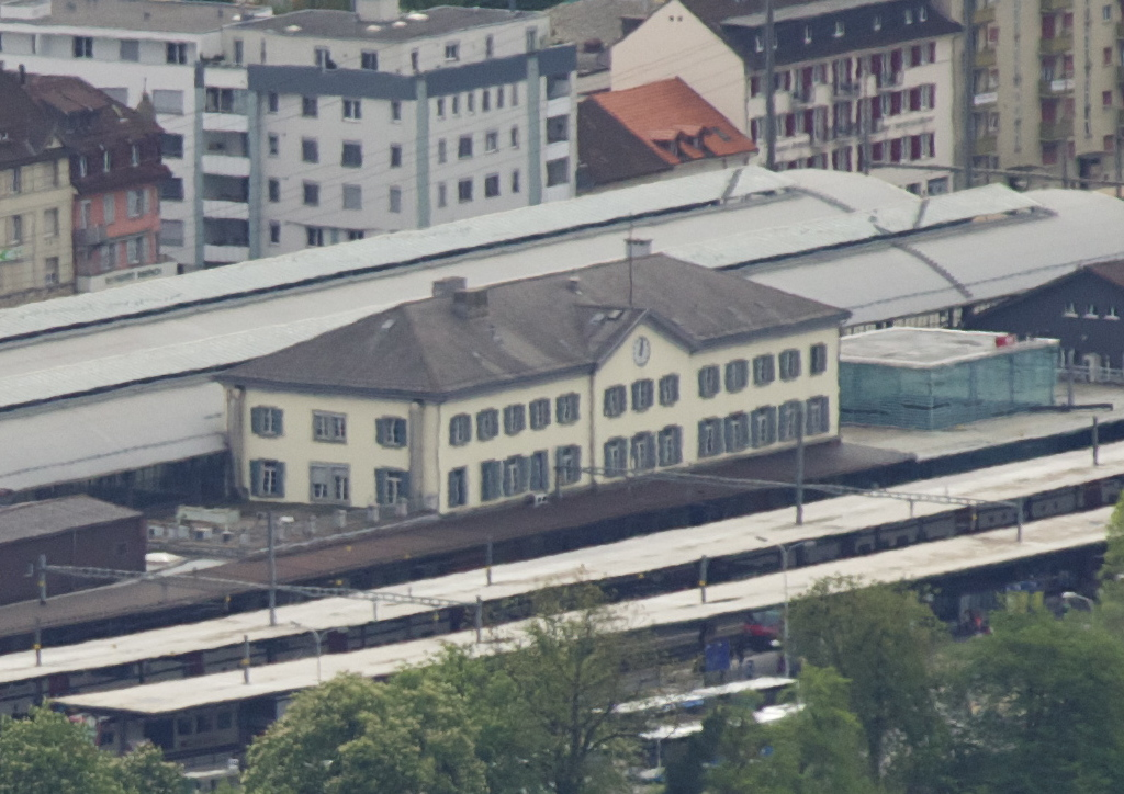 Der Bahnhof Olten, wie er von der Geissflue aus zu sehen ist. Im Vordergrund - auf der linken Seite der Aare - das Kantonsspital Olten, oben rechts im Bild Gebäude des Berufsbildungszentrums Olten.